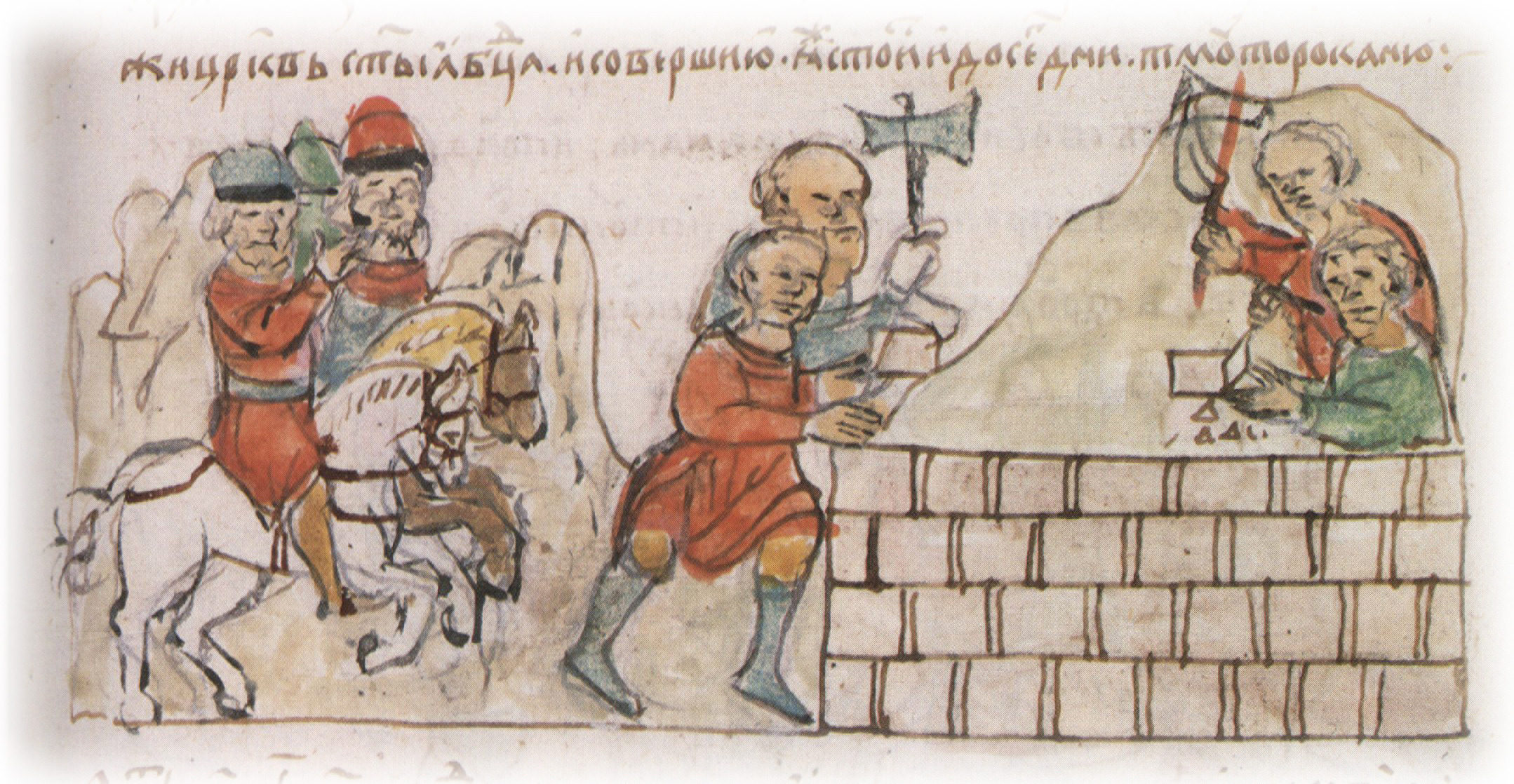 Возвращение Мстислава Владимировича в Тмутаракань; воздвижение им по обету церкви Богородицы в Тмутаракани. ("И пришед Тмуторокань, заложи церковь Святыа Богородица, и соверши ю, яже стоит и до сего дни Тмутороканю")